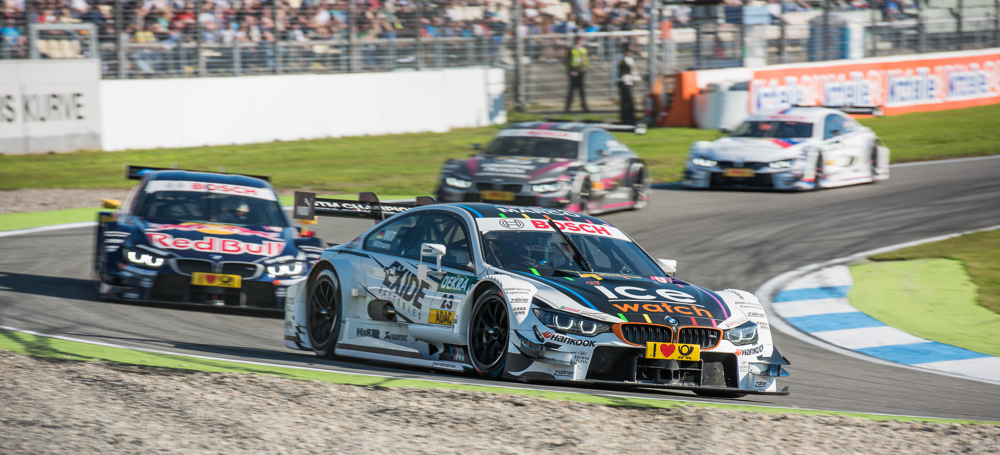 Antonio Felix da Costa,BMW M Performance Zubehör M4 DTM,Crowne Plaza Hotels BMW M4 DTM,DTM,Deutsche Tourenwagen Masters,Hockenheimring,Ice-Watch BMW M4 DTM,Joey Hand,MTEK GmbH,Marco Wittmann,Martin Tomczyk,Motorsport,RBM,RMG,Racing Bart Mampaey,Red Bull BMW M4 DTM,Reinhold Motorsport GmbH,Schnitzer Motorsport GmbH